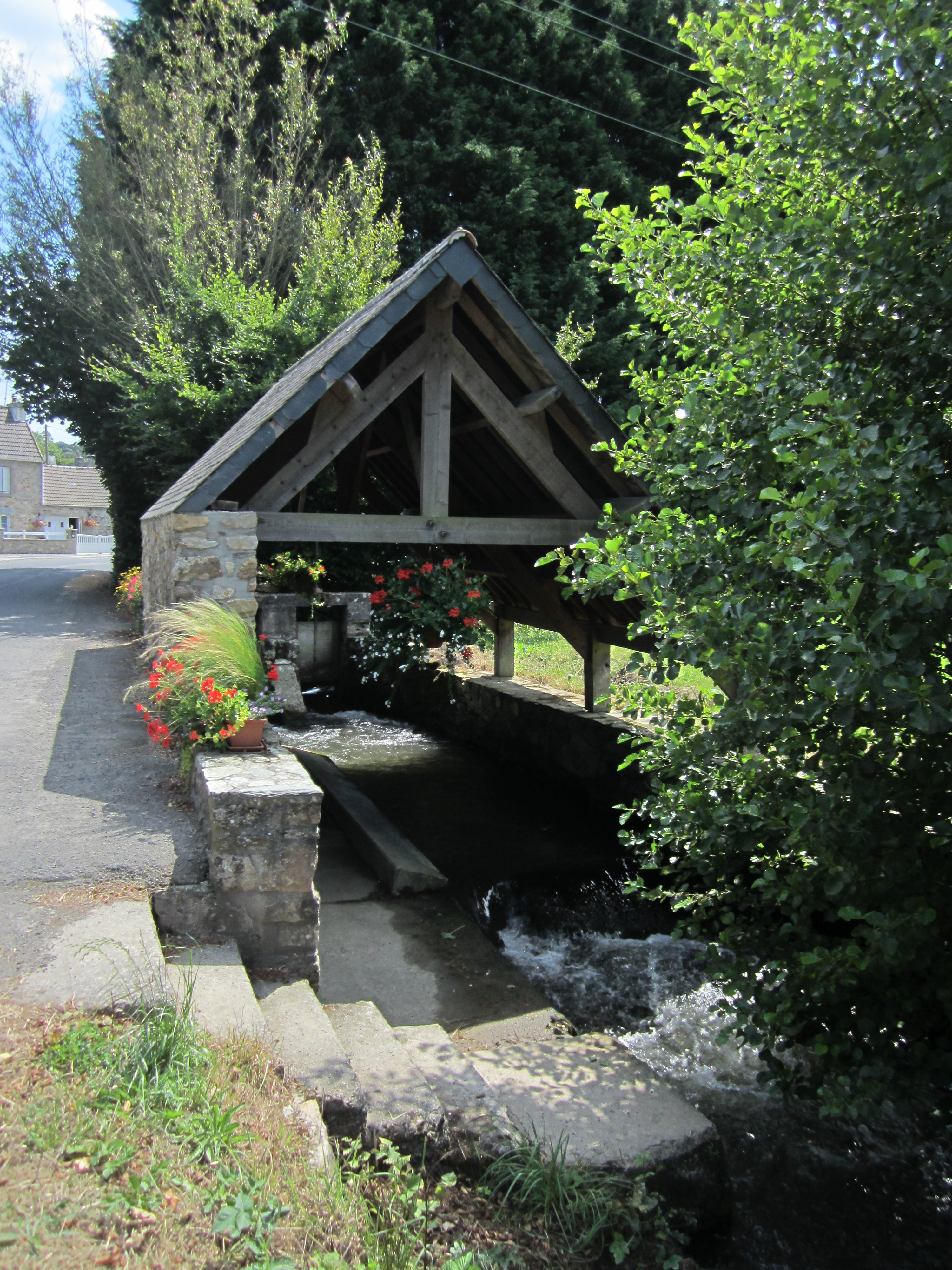 Sideville, Manche